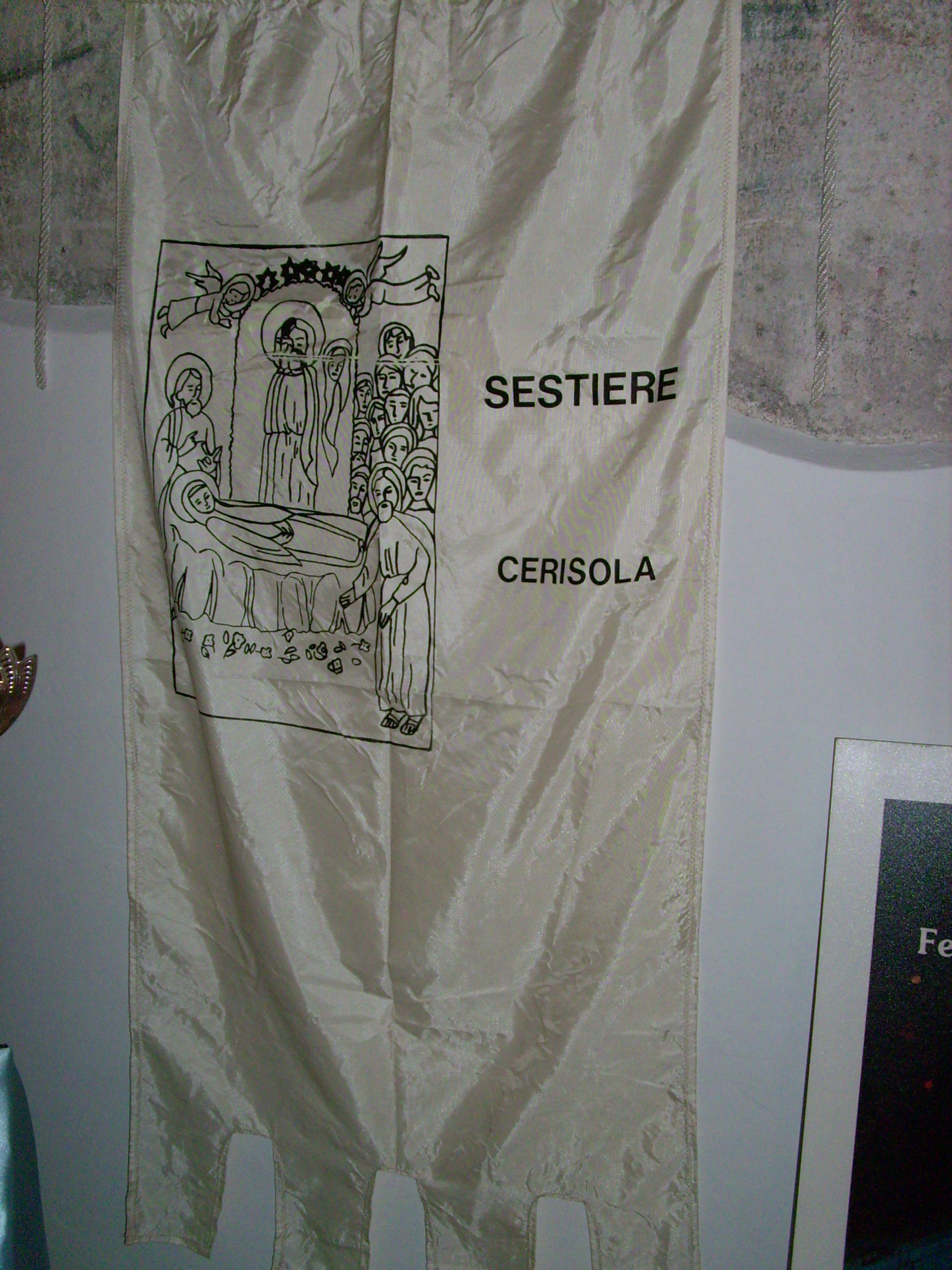 Bandiera del Sestiere Seglio di Rapallo, Liguria, Italia